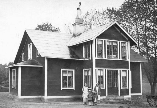 Hedvigslundstorpet